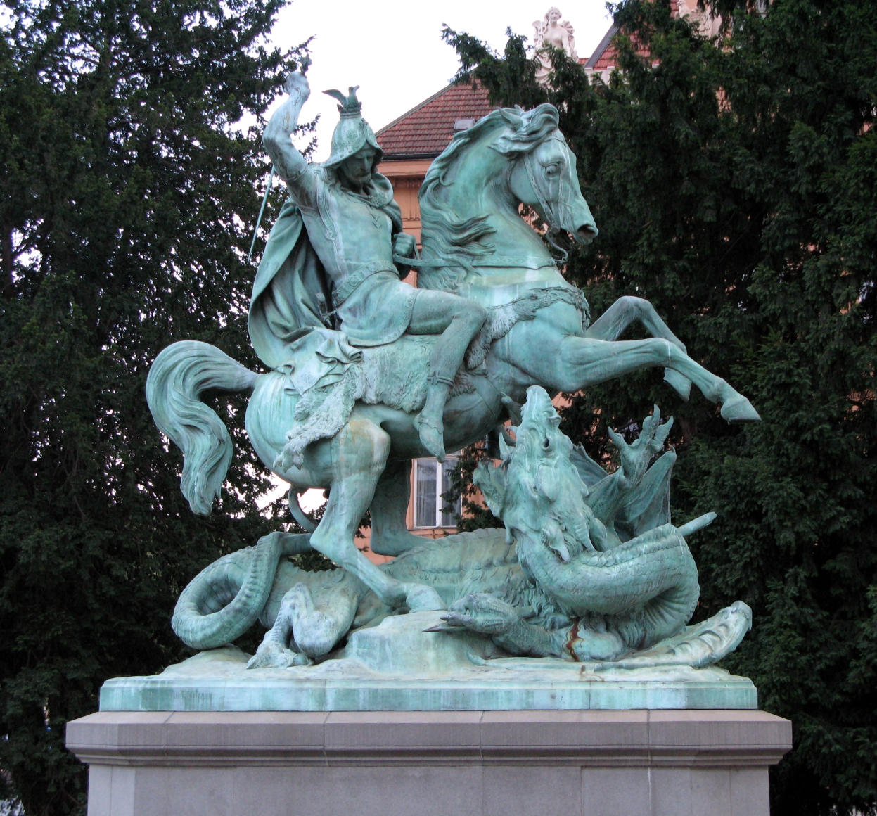 Sveti Juraj, Antuna Dominika Fernkorna, Zagreb